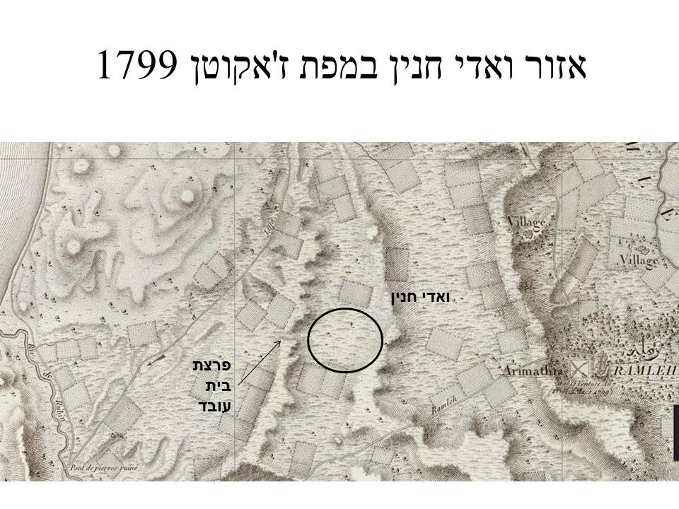 אזור ואדי חנין (נס ציונה של היום) במפת ז'אקוטן ששורטטה בשנת 1799